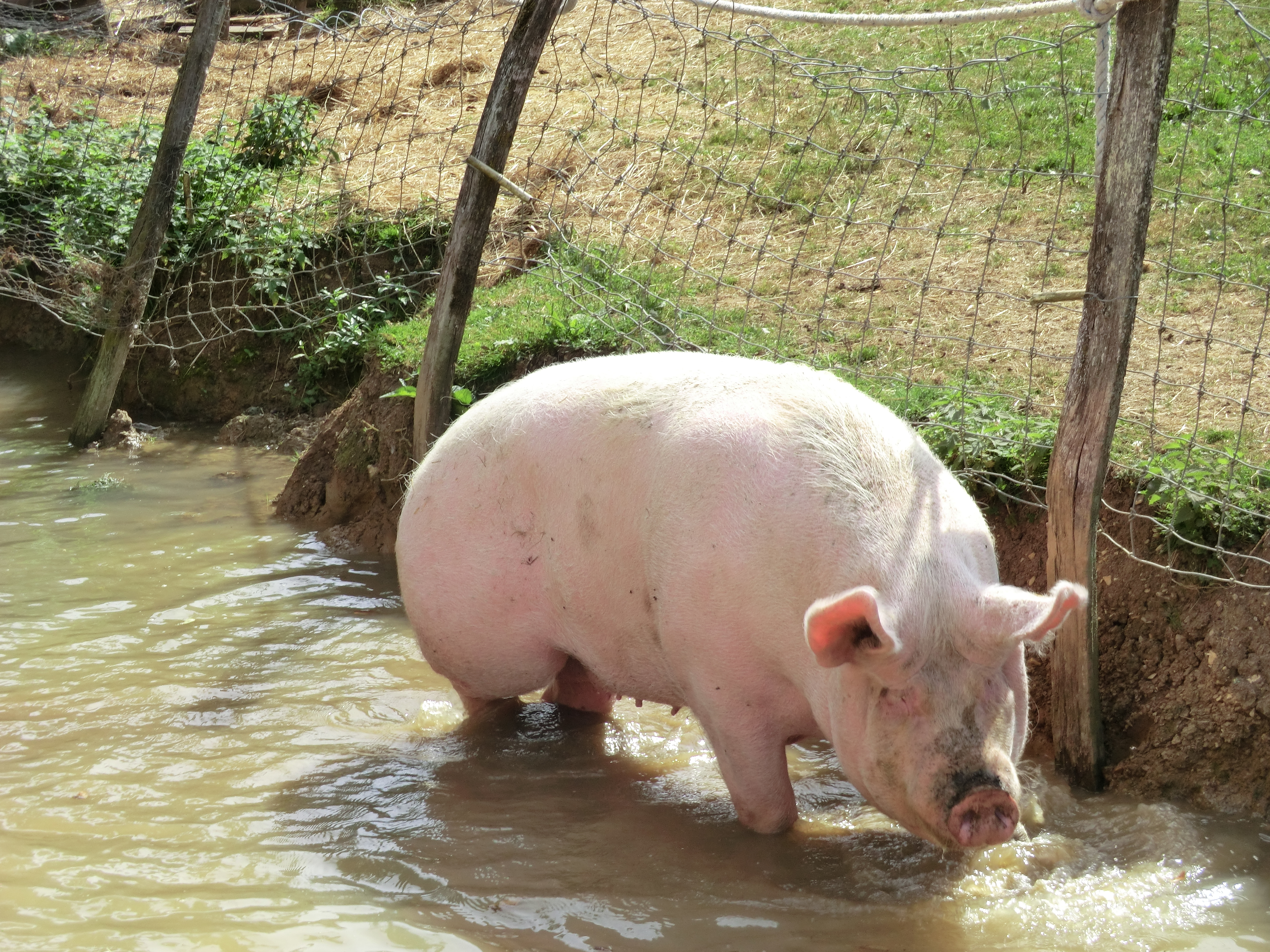 Moulin du Vanneau.